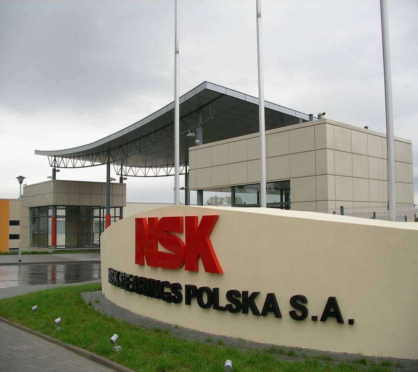 NSK plant in Poland